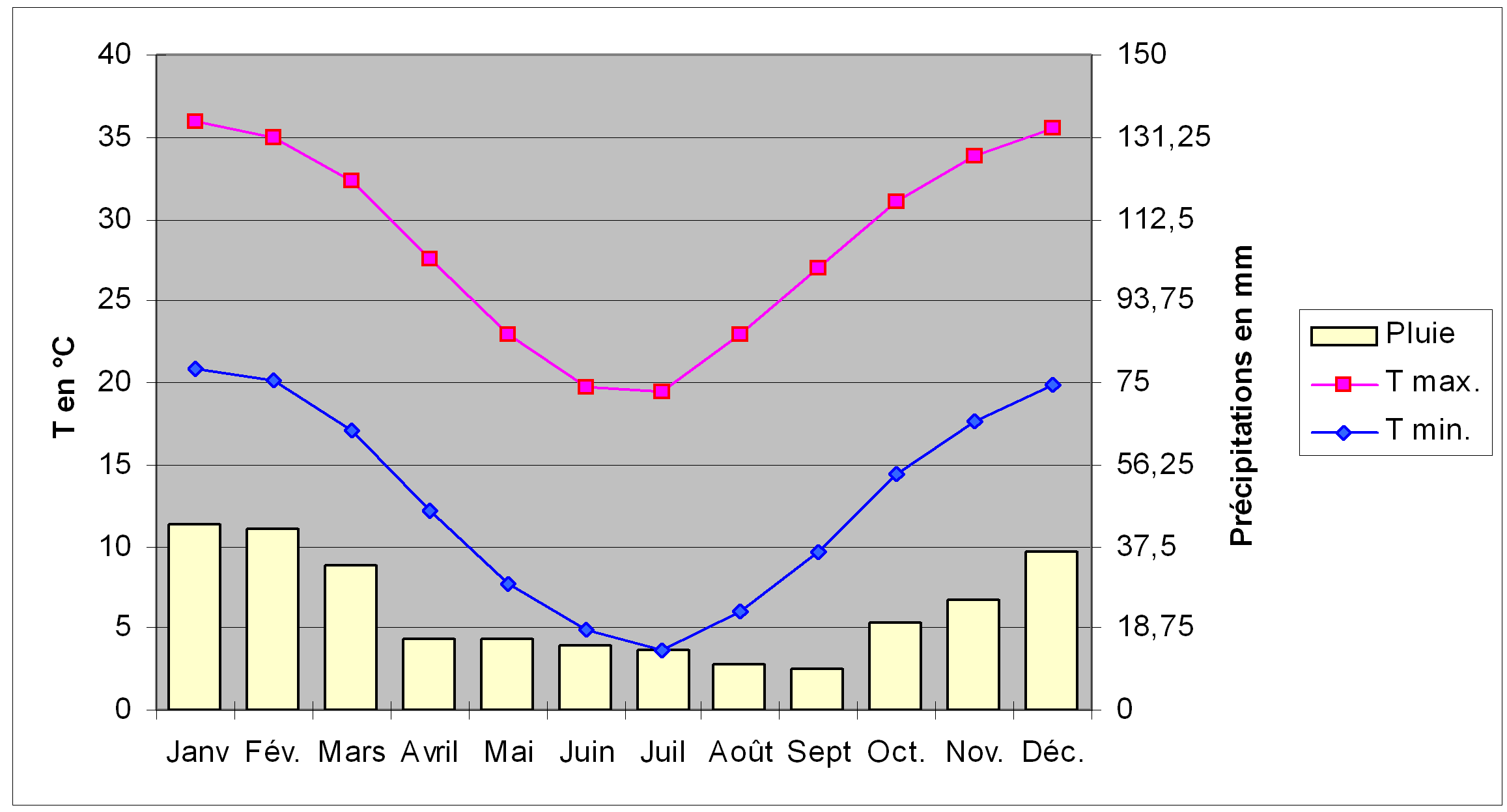 Diagramme climatique de la ville d'Alice Springs (Australie), comprenant deux courbes, représentant les températures maximales et minimales, et un histogramme, représentant la pluviométrie, pour les douze mois de l'année.